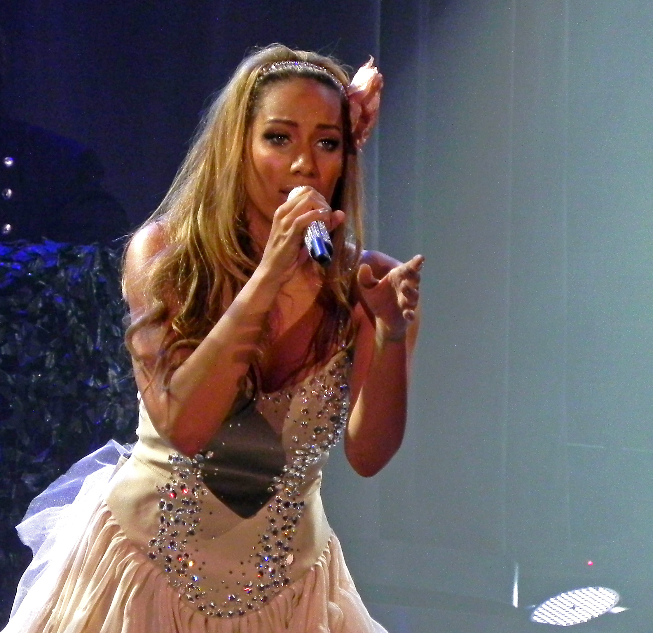 Leona Lewis durante a sua turnê "The Labyrinth" (em português: O Labirinto)